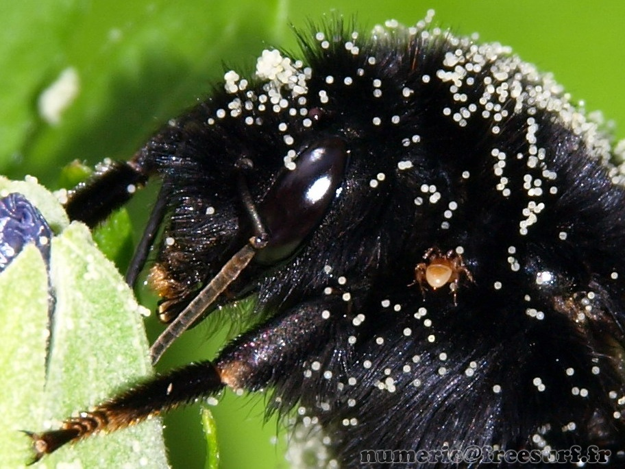 Un bourdon infecté par un acarien ectoparasite.